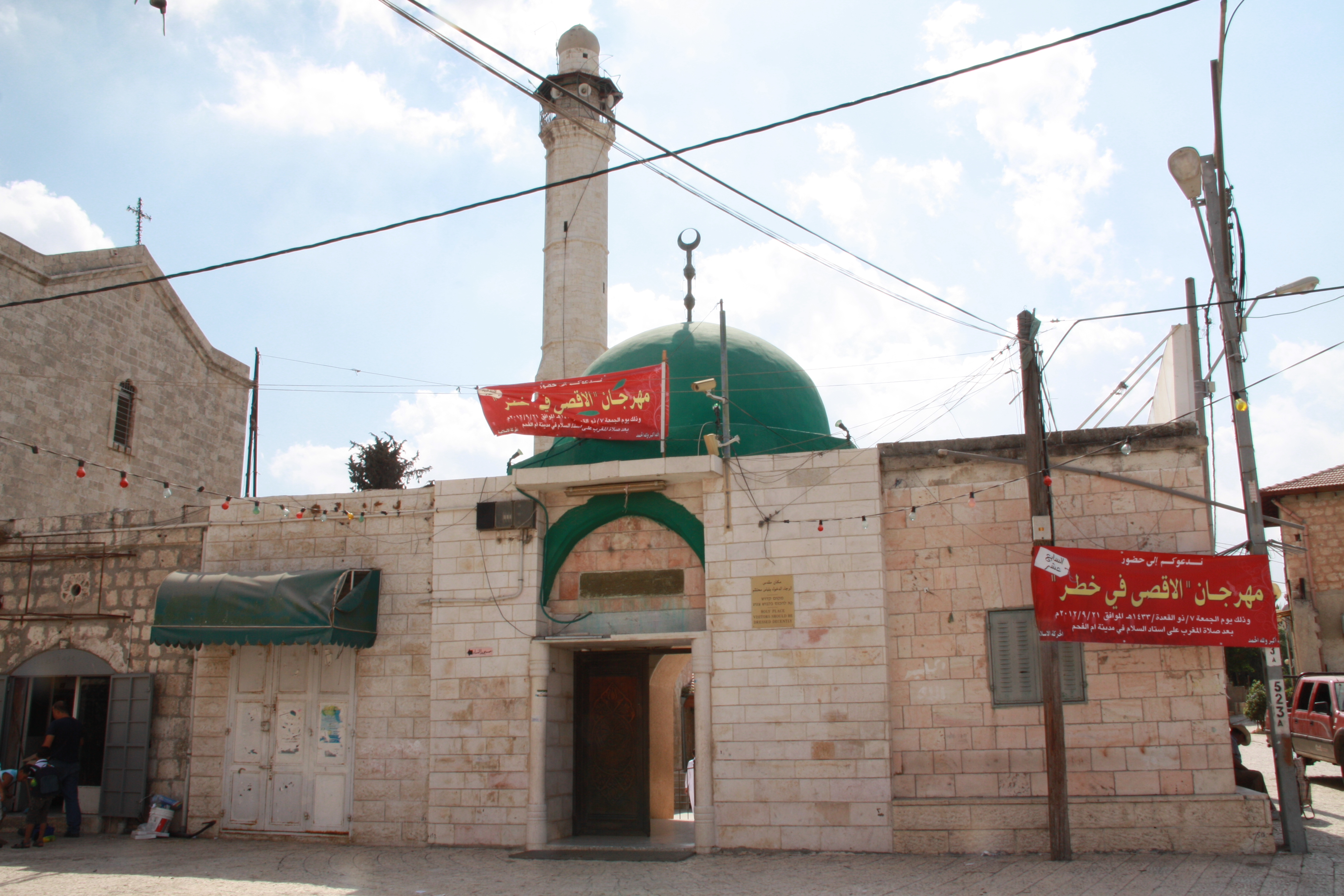 נקרא גם המסגד הגדול (מסגד אל-עומרי) הוקם בשנת 1267 על ידי הסולטאן ביברס הממלוכי.